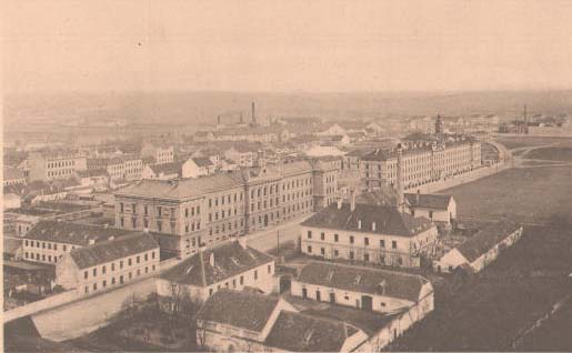 k.k. Landwehr Kaserne in Budweis